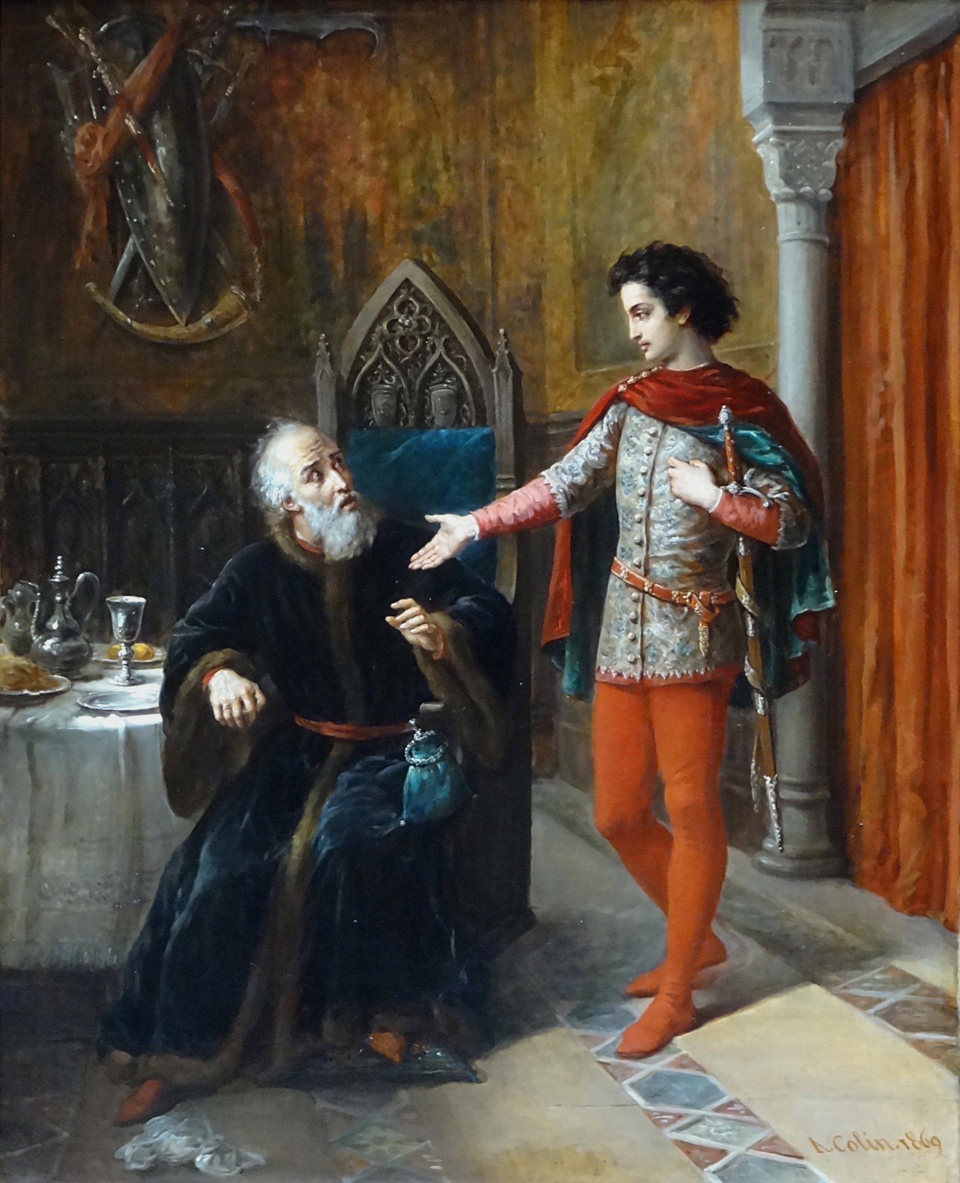 Le Cid, après son duel avec le comte de Gormas, et son père, Alexandre-Maris Colin, 1869. Musée des beaux-arts d'Amiens.